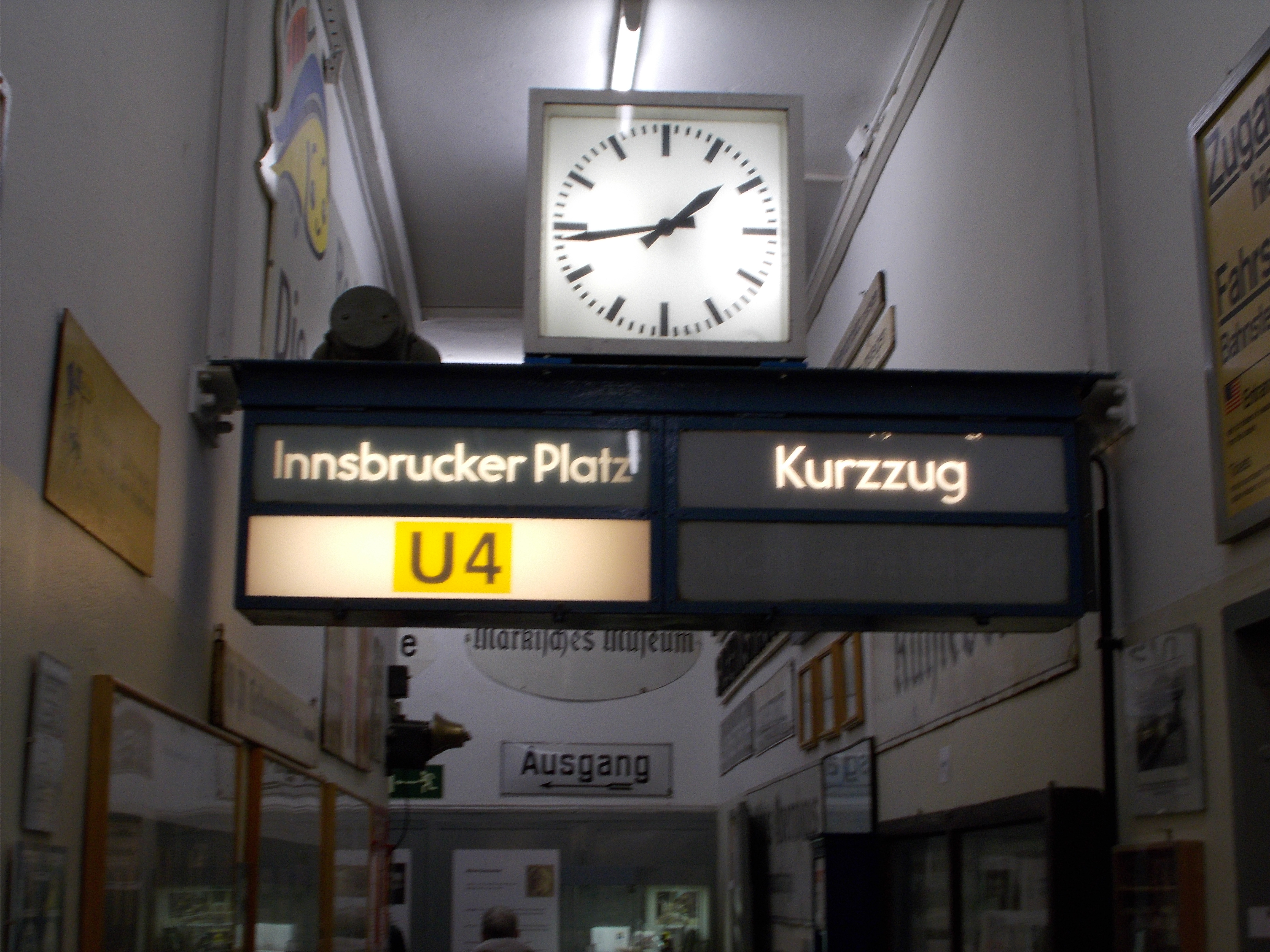 Anzeigetafel der Berliner U-Bahnlinie U4 im Berliner U-Bahn-Museum